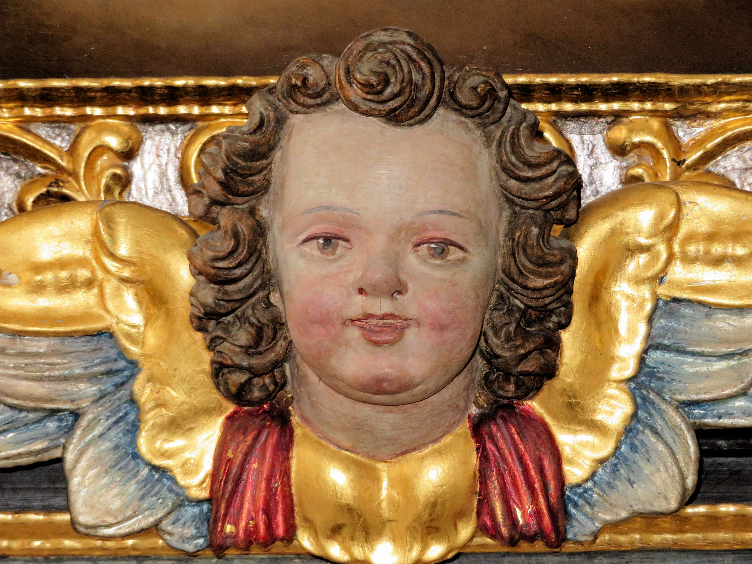 St. Peter und Paul in Hopfen am See ist eine barockisierte Kirche, deren Ursprünge wohl auf das 11. Jh. zurückgehen. Sie enthält gotische Fresken und Malereien von Claudius Schraudolph dem Älteren sowie Stuck von Joseph Fischer aus Faulenbach.